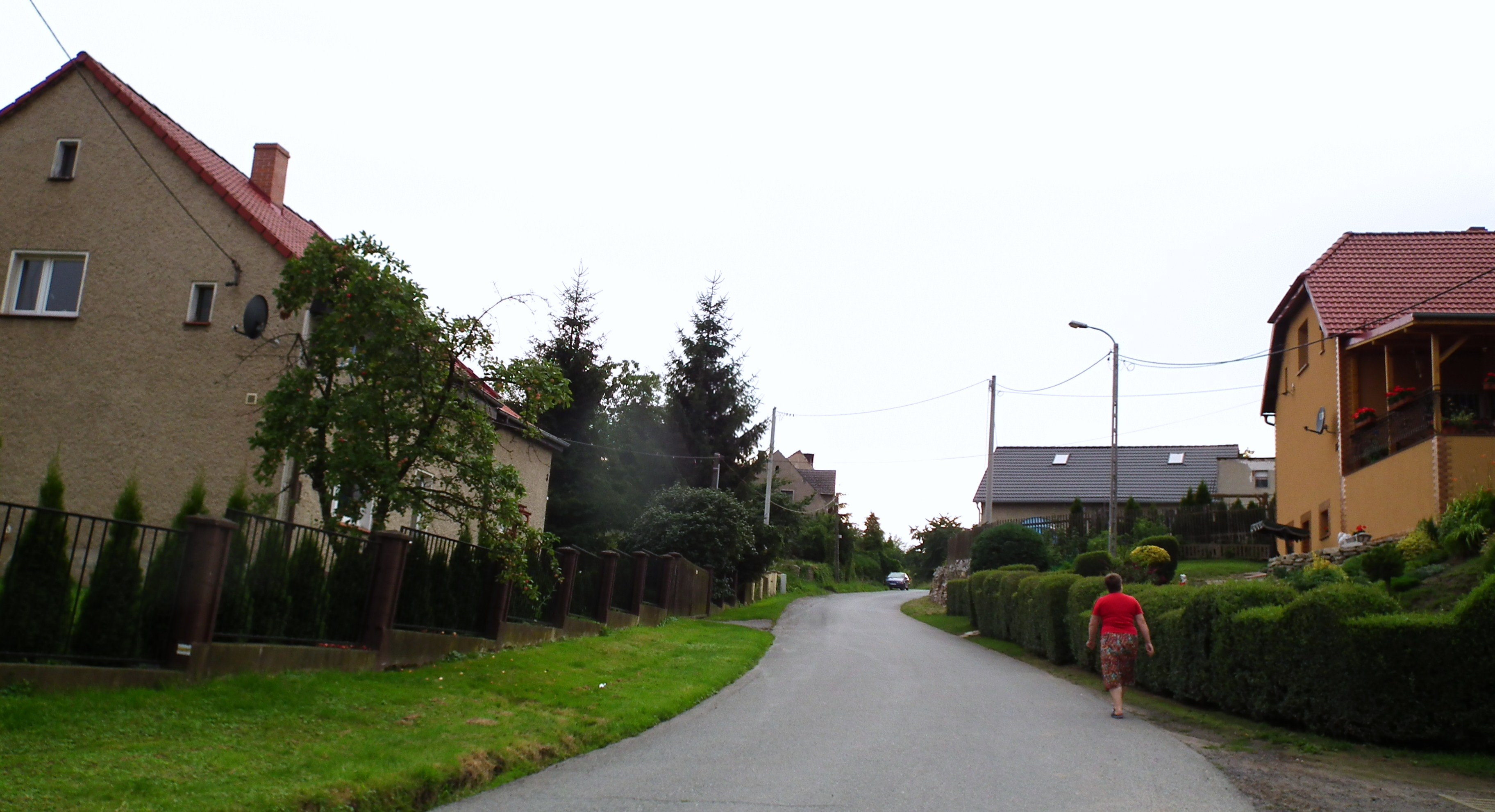 Centrum wsi Kowalskie koło Niemczy.